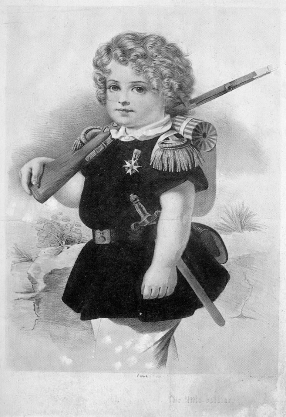 Der kleine Soldat/The little soldier. Im Original kolorierte Lithografie nach französischen Studienblättern.